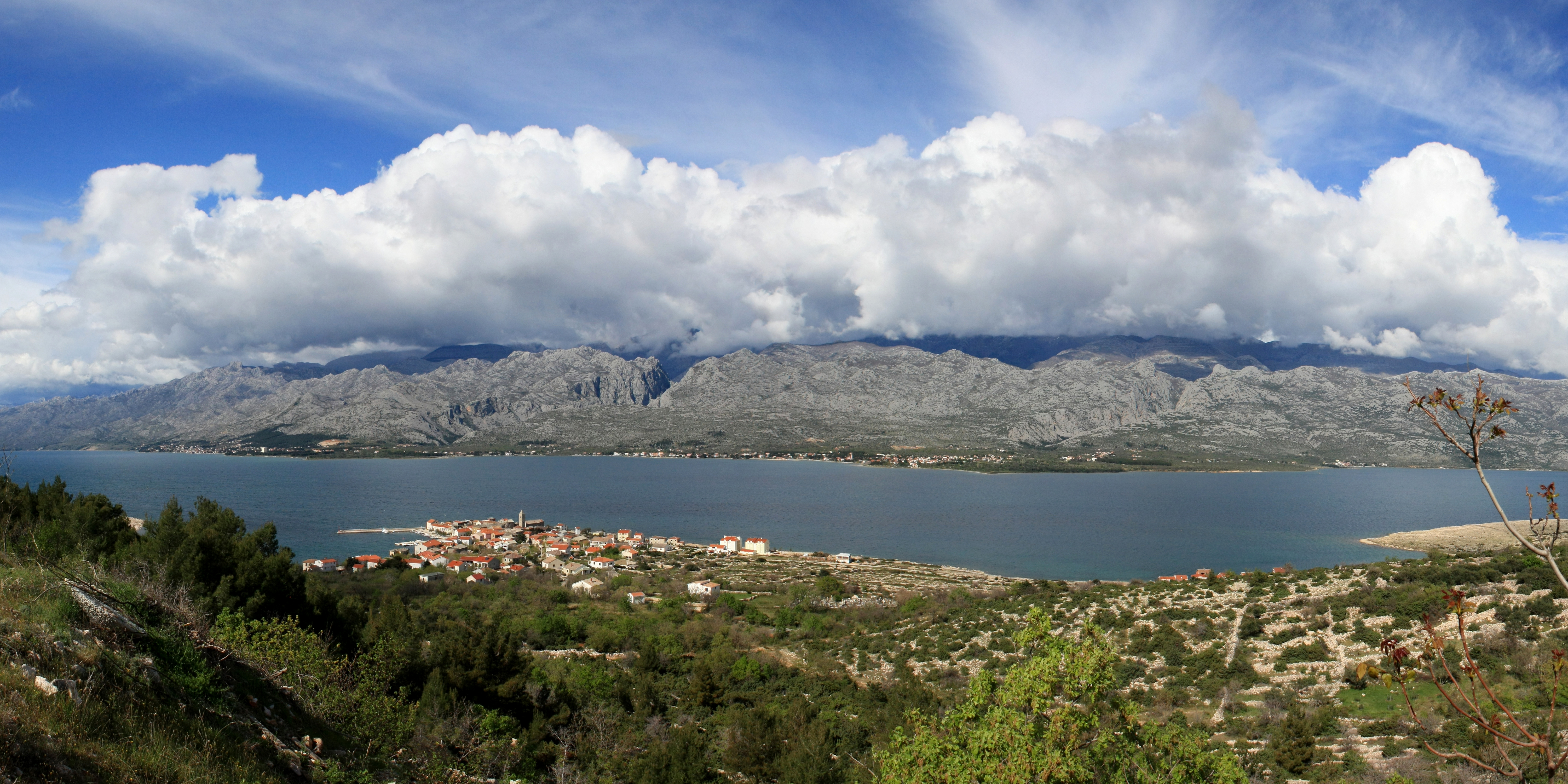 Kulturno-povijesna cjelina naselja Vinjerac